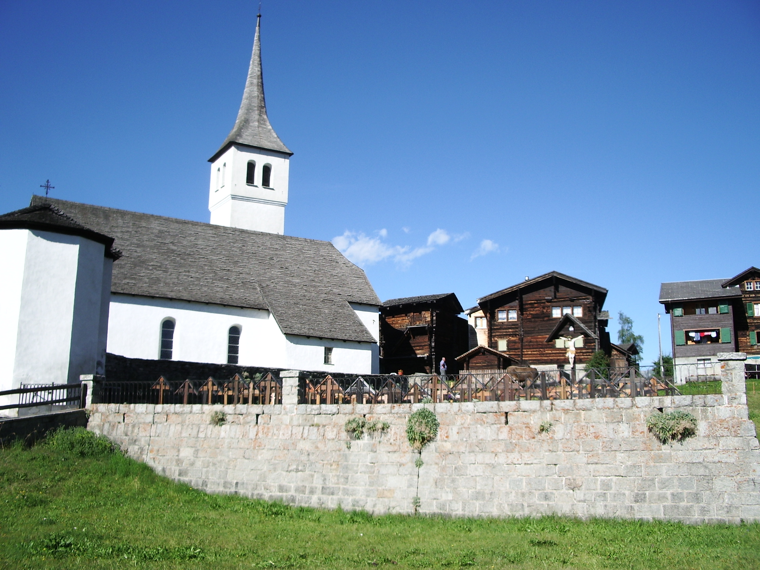 Bellwald VS: Kirche und Dorfkern Bild selbst gemacht am 3.8.2005